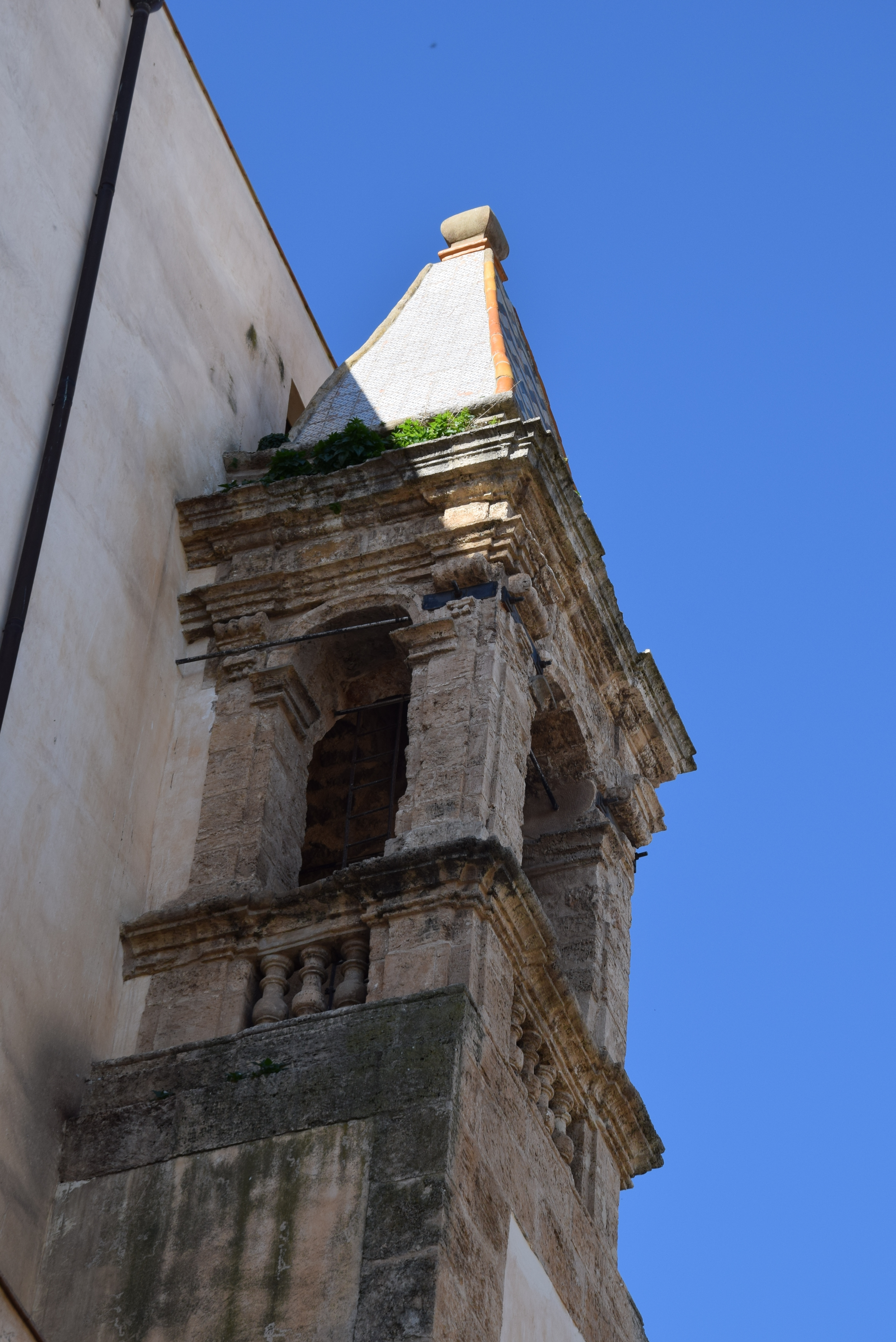 Chiesa del Collegio dei Gesuiti (Alcamo)